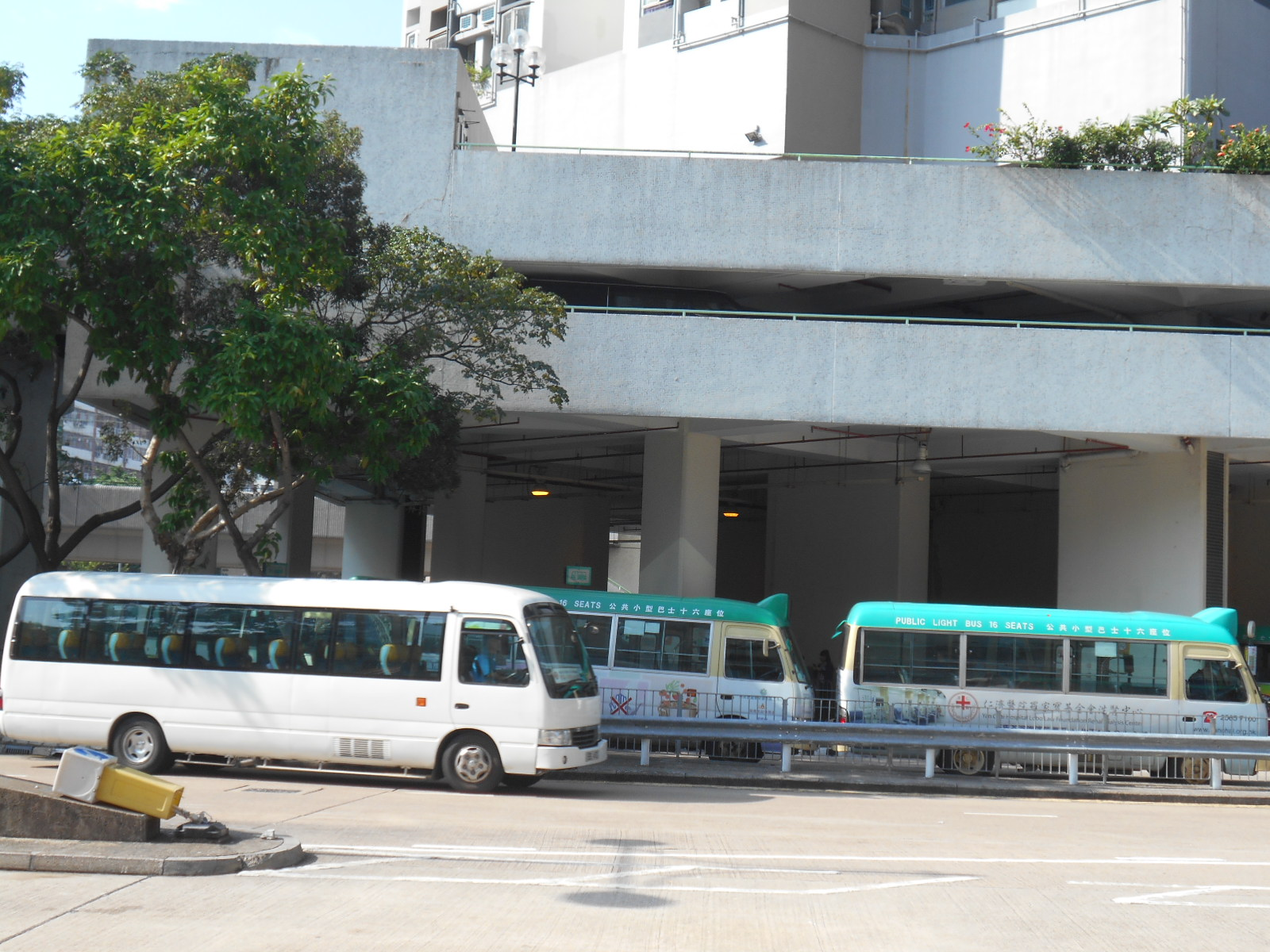 中文（香港）: 葵芳地鐵站公共交通交匯處的小巴部分(2016年)